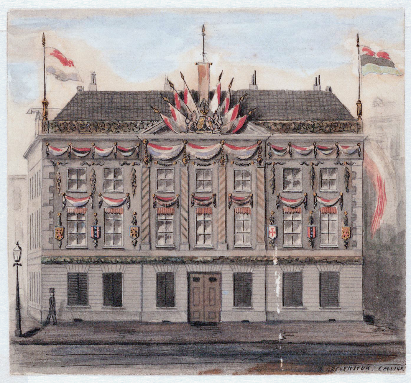 Gebouw versierd met vlaggen en decoraties ter gelegenheid van het huwelijk van koning Willem III en koningin Emma pen, waterverf met goud gehoogd 10,2x11,1 cm 1879